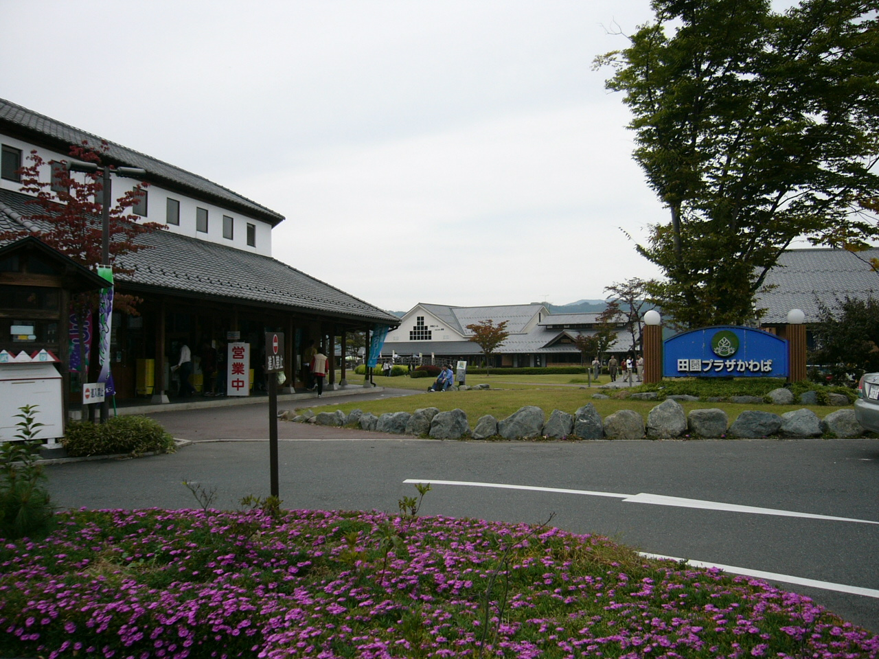 Michinoeki kawaba Den-en Plaza (Gunma) (道の駅川場田園プラザ)